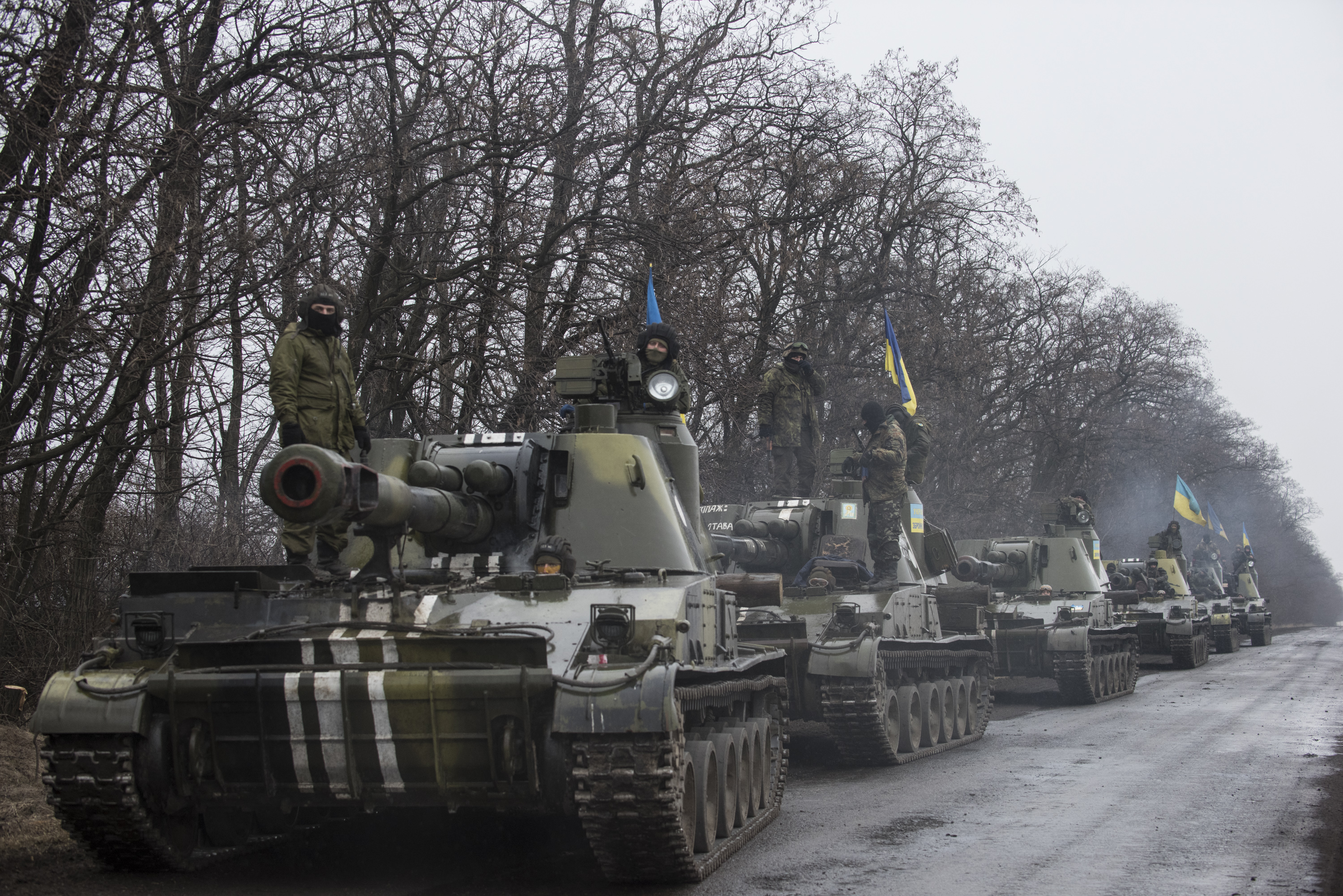 March, 2015